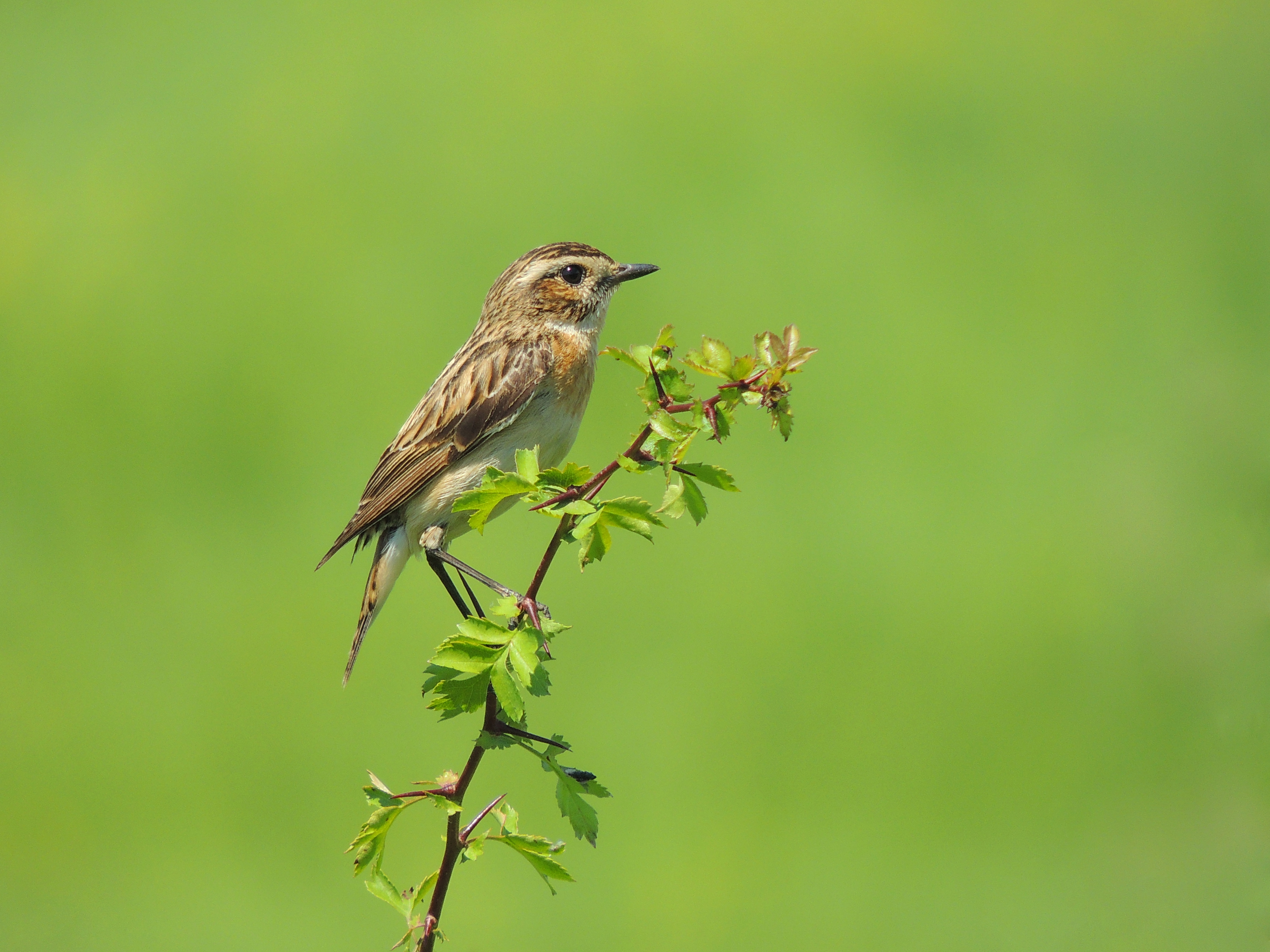 whinchat Braunkehlchen mărăcinar